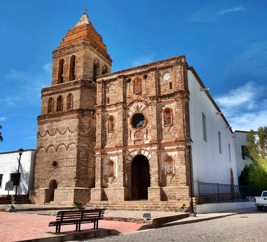 Templo histórico de Nuestra Señora de la Asunción, en Arizpe, Sonora.